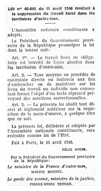 Fac-simile de la Loi N° 46-645 tendant à la suppression du travail forcé dans les territoires d’outre-mer, votée le du 11 avril 1946 au parlement français. Rapporteur Félix Houphouët-Boigny.